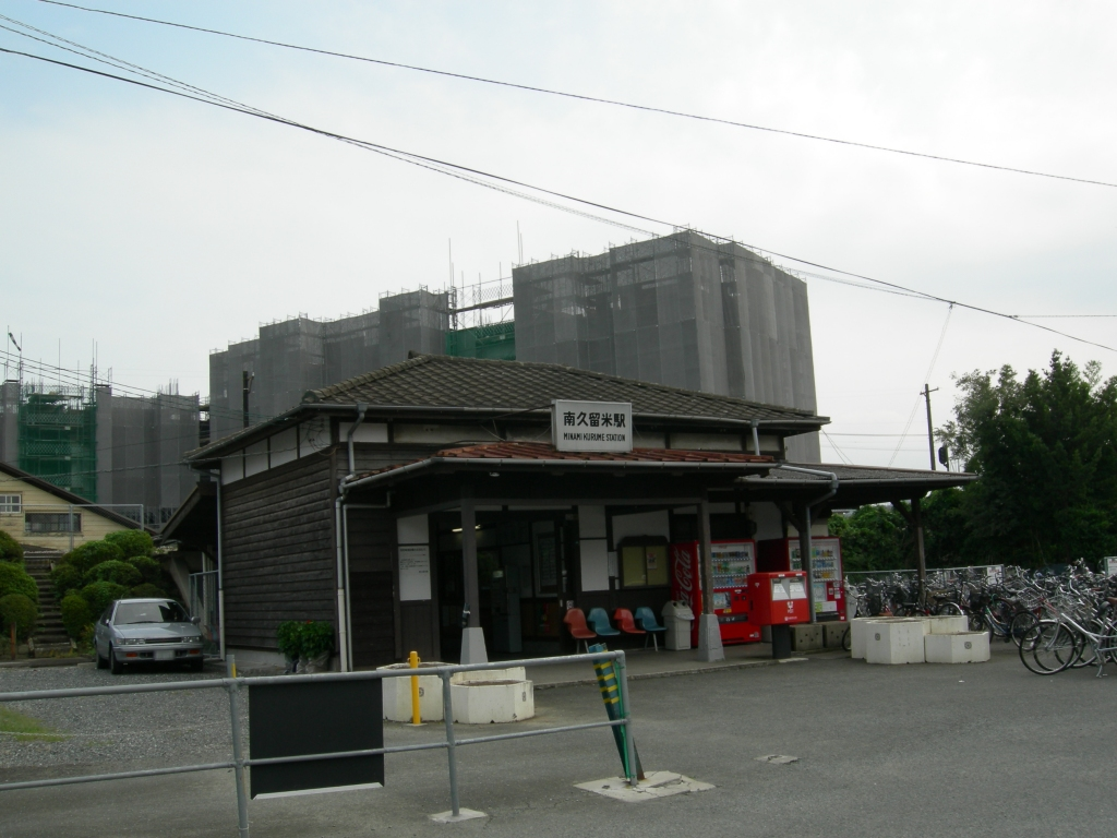 南久留米駅（2006年9月自身撮影）